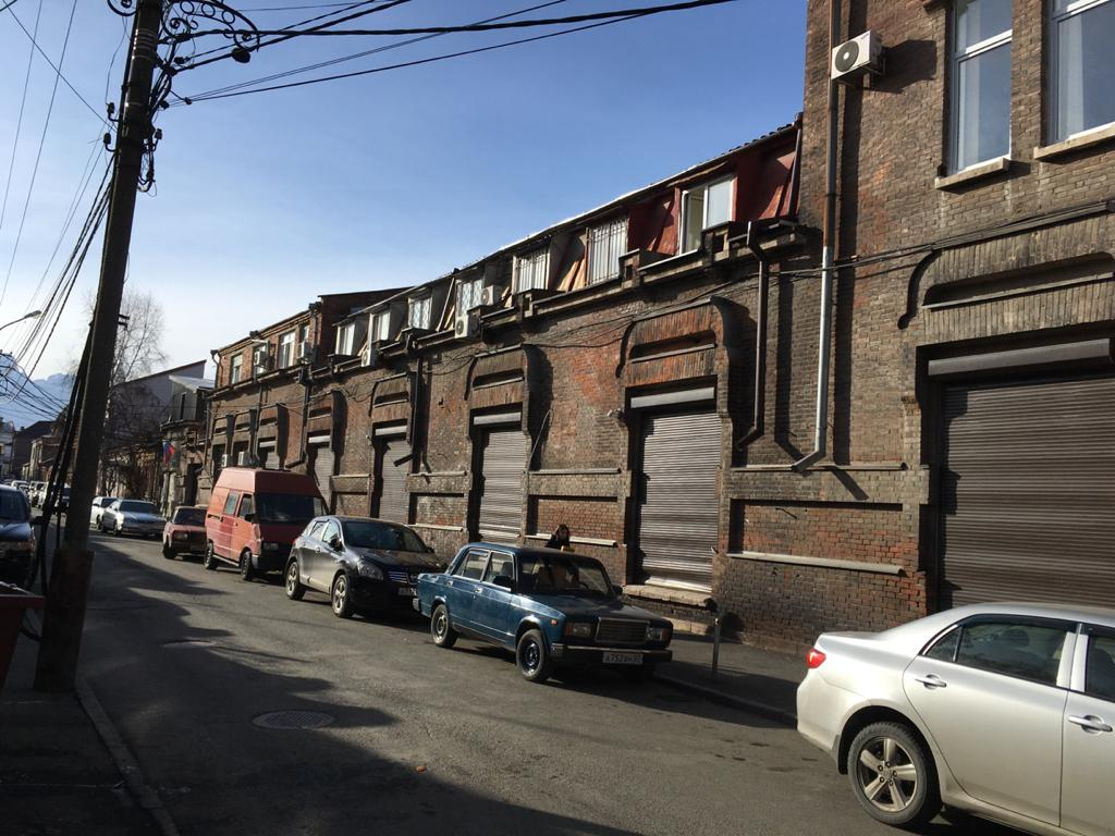 Торговая фирма «Каракозов-Оганов»: переулок Вахтангова, 11 / улица Джанаева, 20, Владикавказ, Северная Осетия